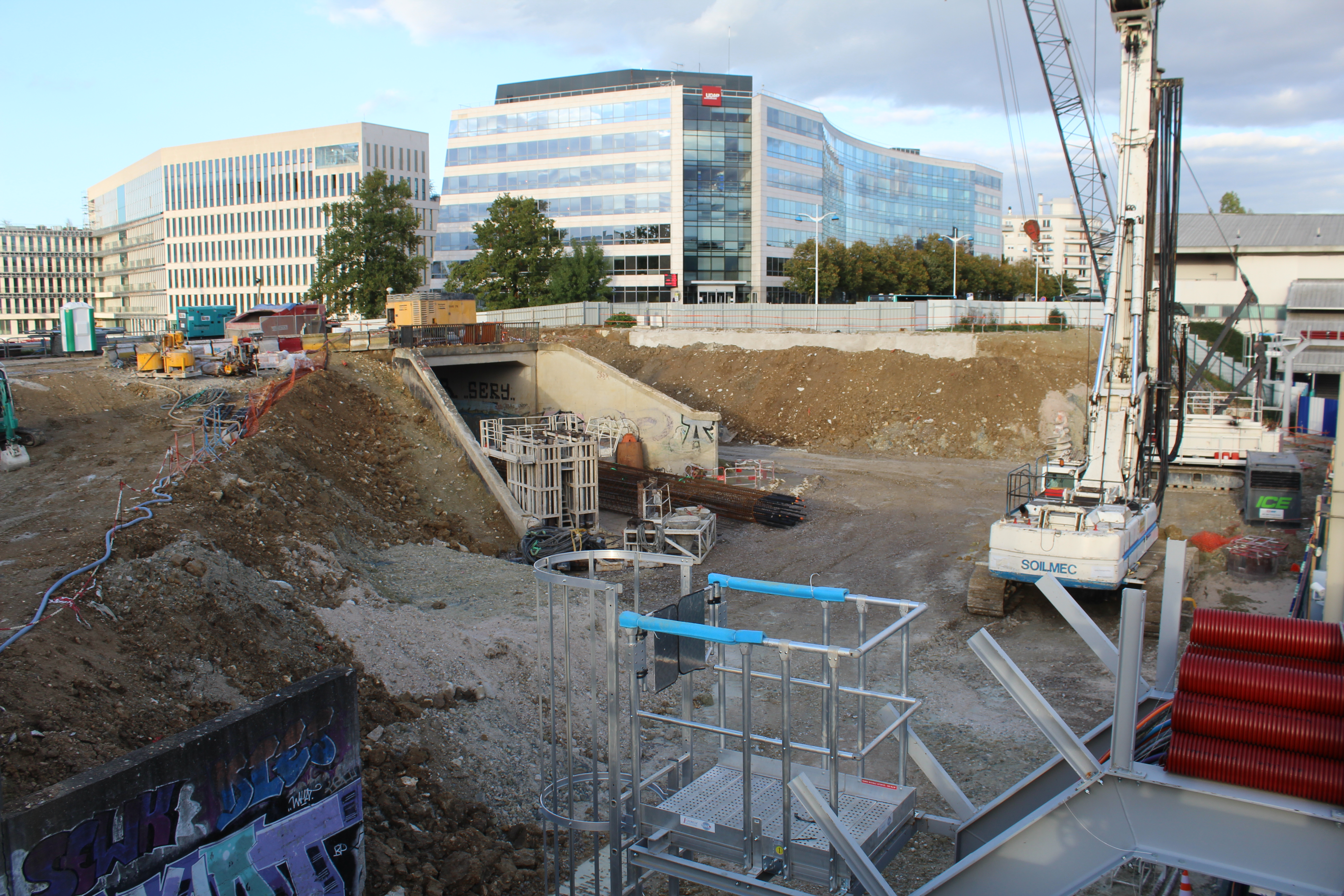 Chantier autour de la gare de Noisy - Champs des lignes 15 et 16 du métro de Paris.